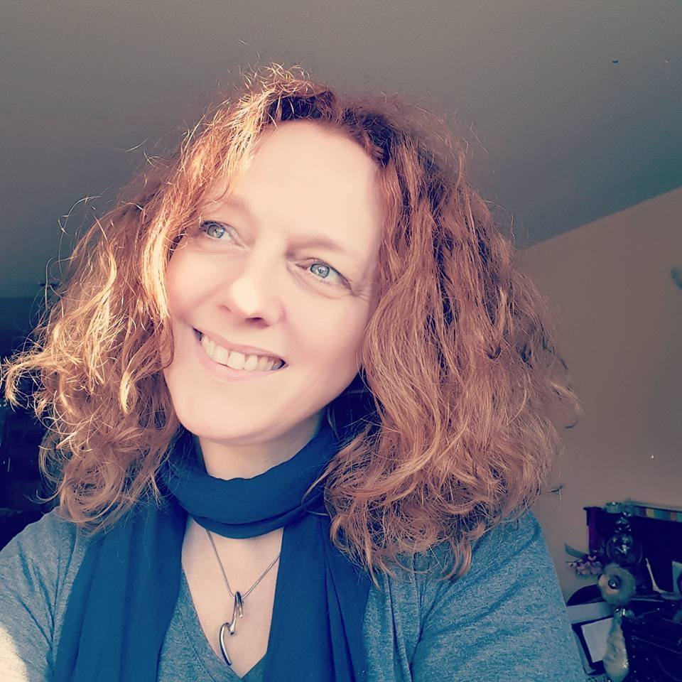 Natasza Tardio, zelfportret. Foto gemaakt met zelfontspanner op 12 april 2016